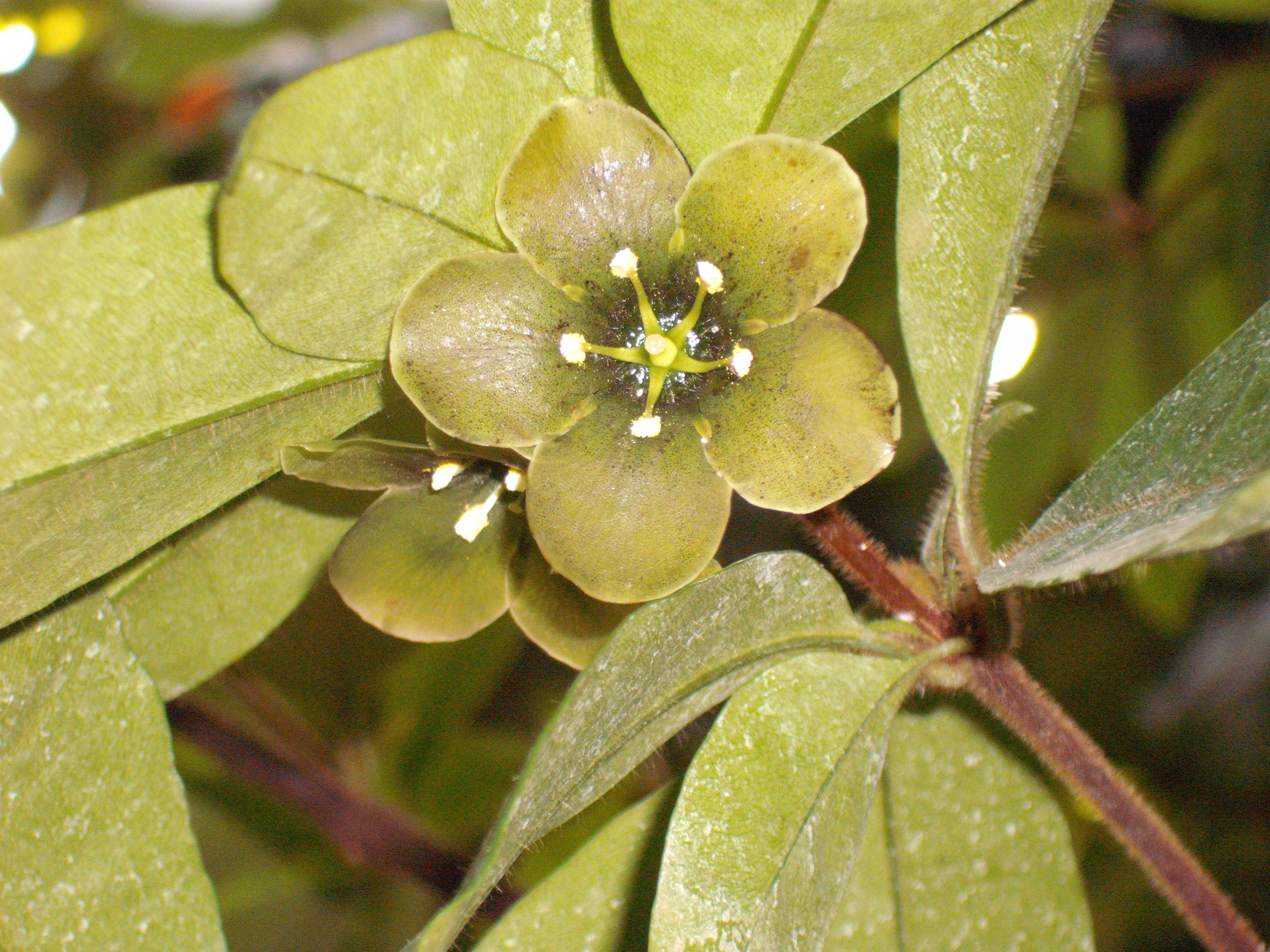 Smaragdblumen